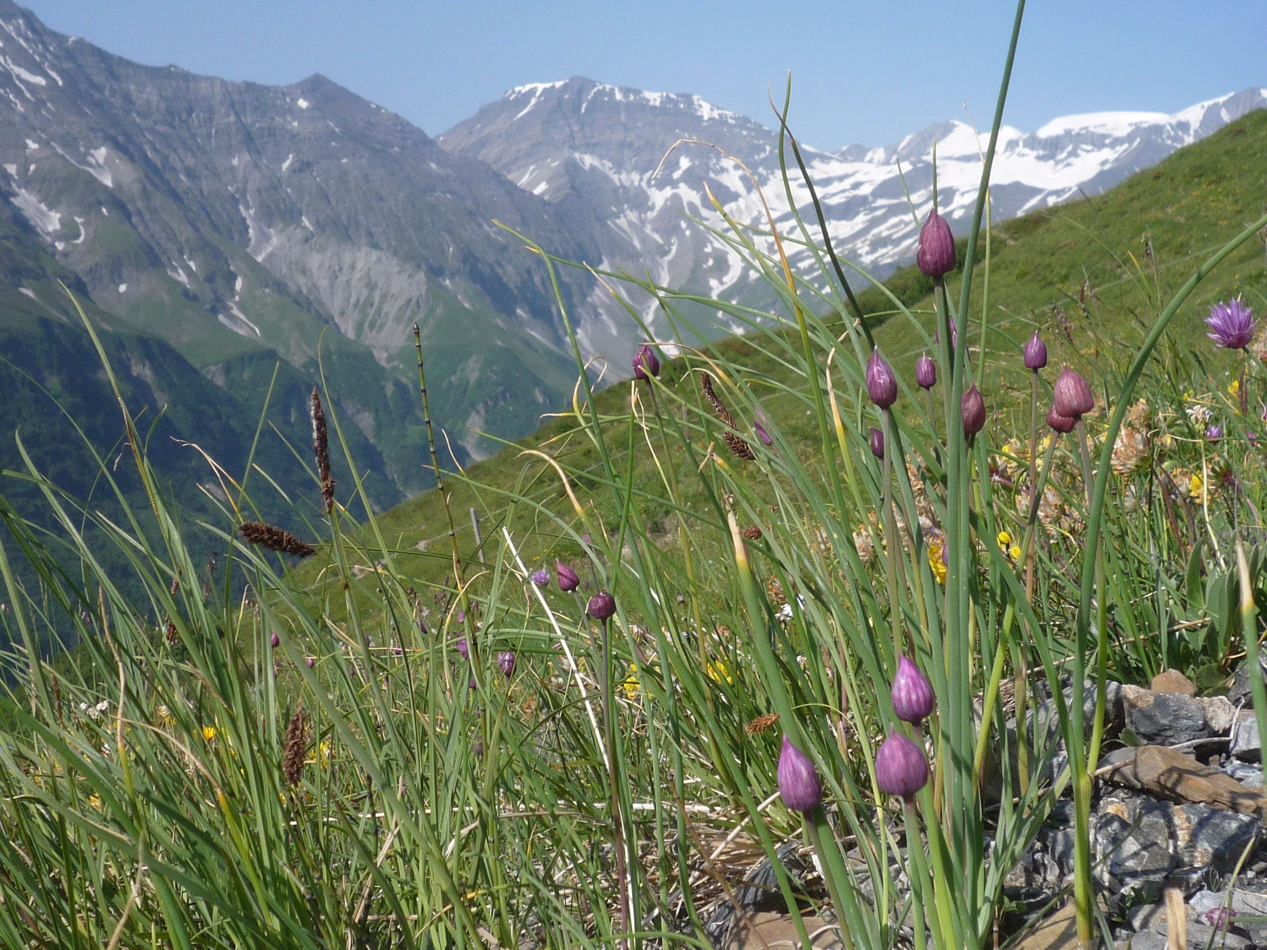 Schnittlauch auf der Malanser Alp